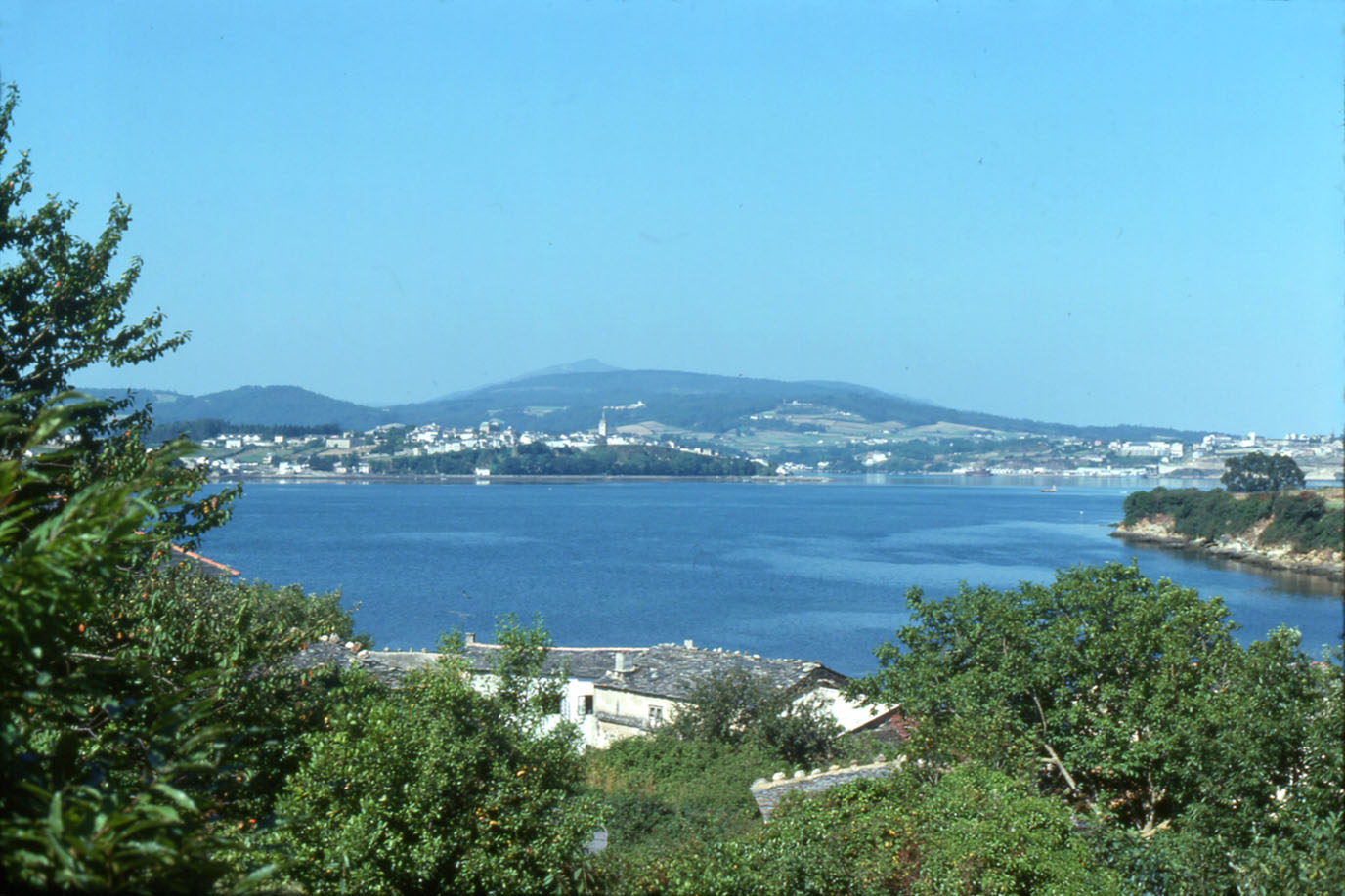 Castropol (Asturias, España) y la ensenada de la Liñeira, en la Ría de Ribadeo, vistos desde ese lugar. C. 1975